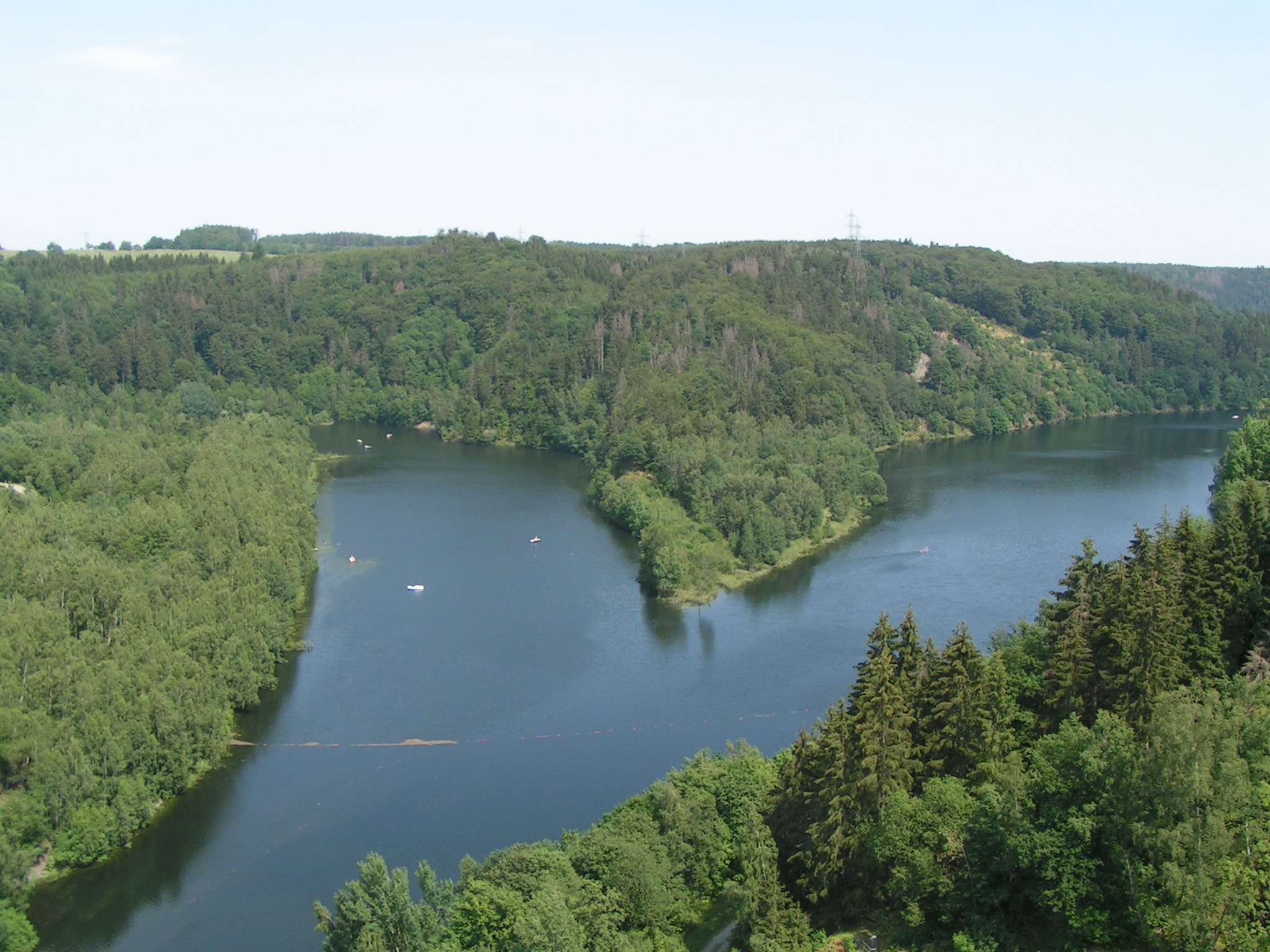 Der Wendefurther Stausee, von der Staumauer der Rappbode-Talsperre aus gesehen